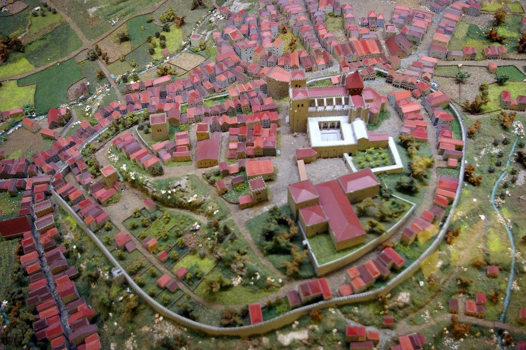 "Casa do Infante" museum in Porto, Portugal